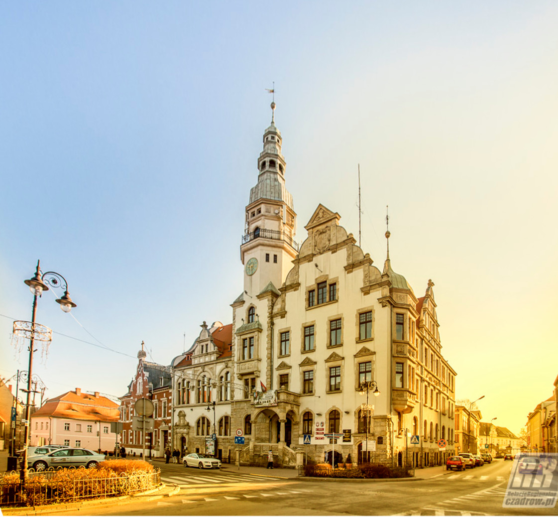 Ratusz w Kamiennej Górze 58-400